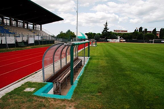 Stadio Comunale Valentino Mazzola, Santarcangelo di Romagna (RN), Via della Resistenza, 5